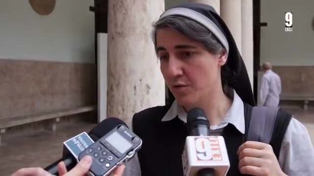 La Monja Teresa Forcades, entrevistada pels treballadors de Canal 9.